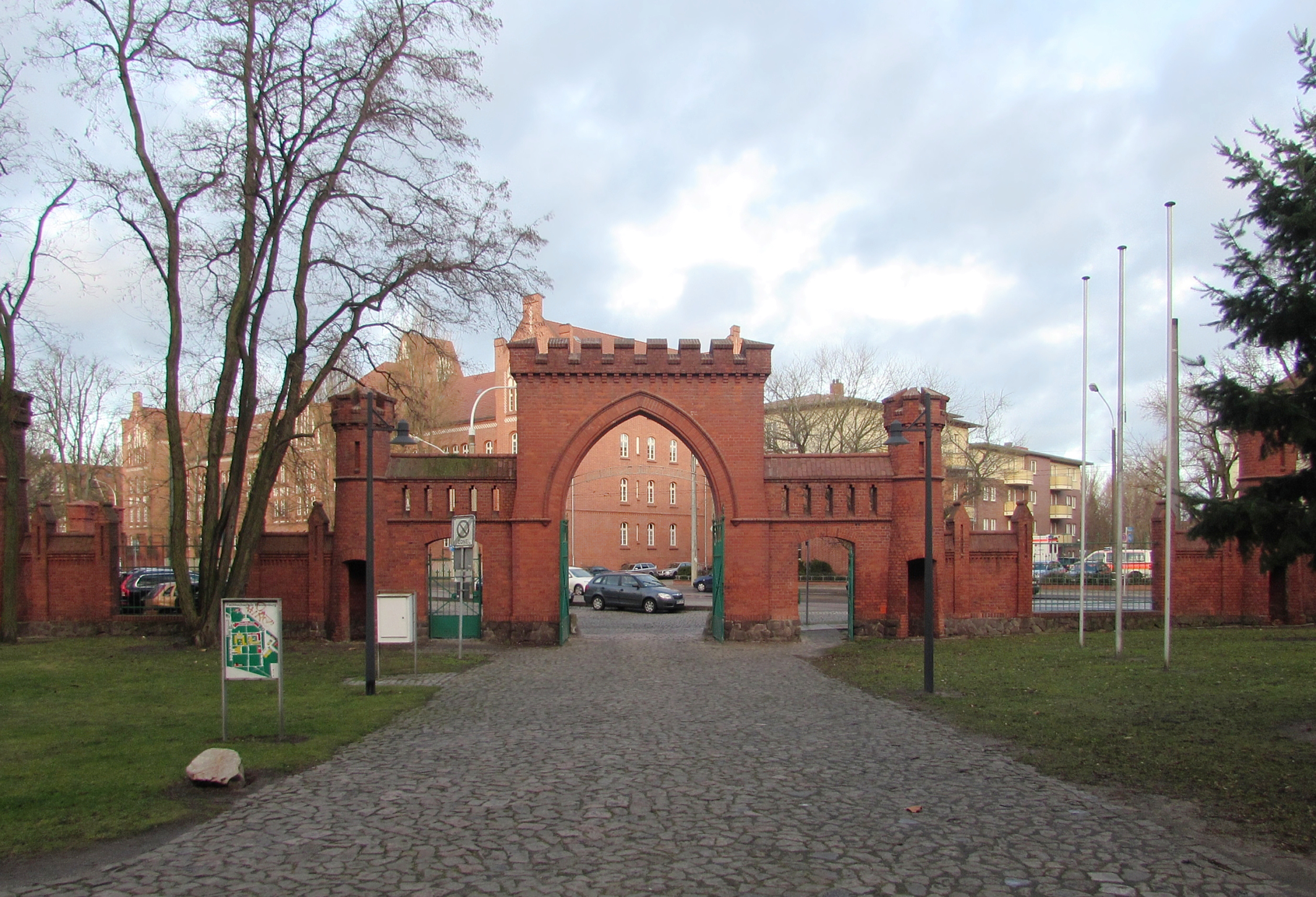 Tor der TH Brandenburg, ehemaliges Tor der Kürassierkaserne